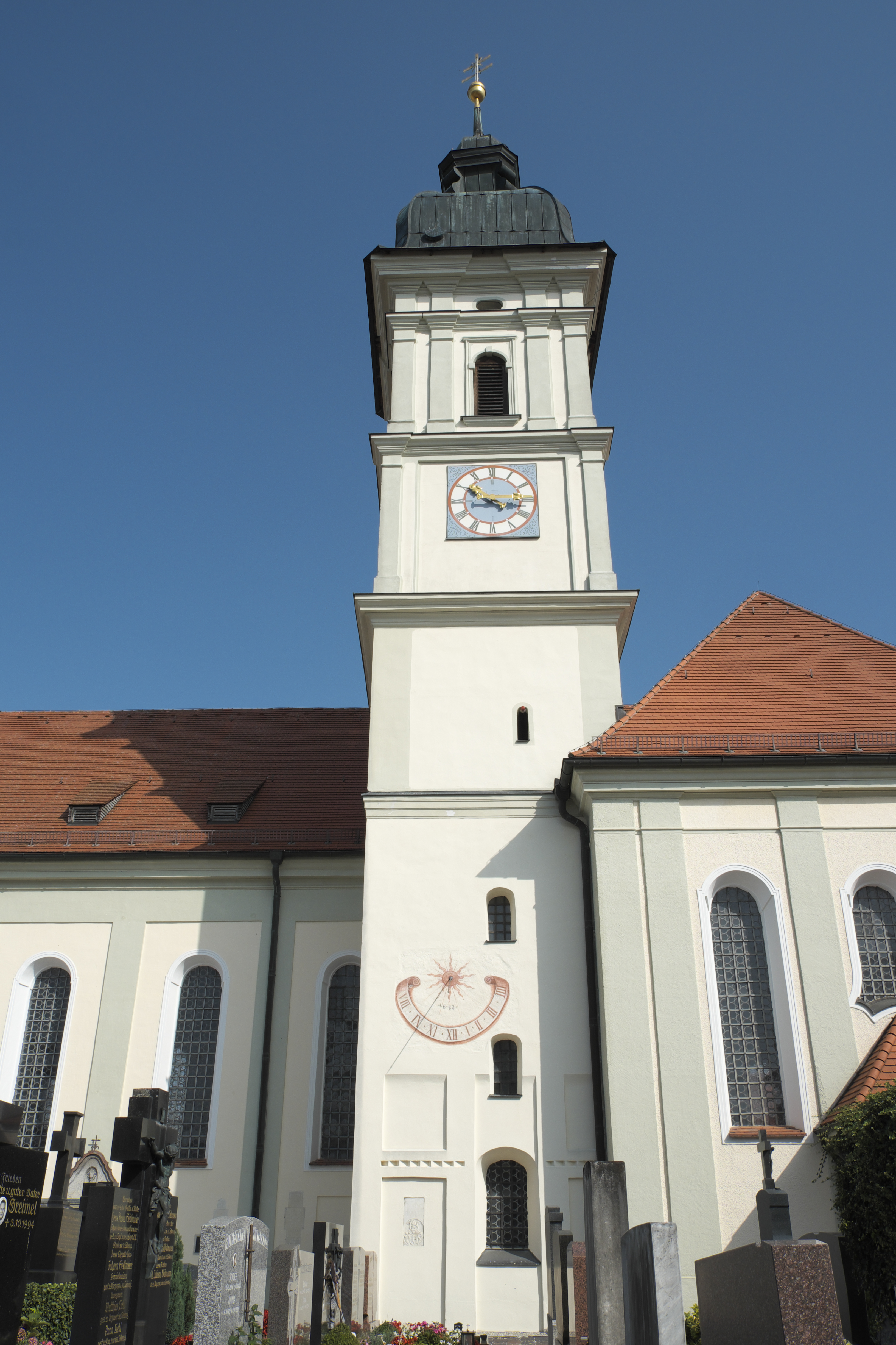 Katholische Pfarrkirche St. Michael in Reichenkirchen (Fraunberg) im Landkreis Erding (Bayern/Deutschland), Glockenturm